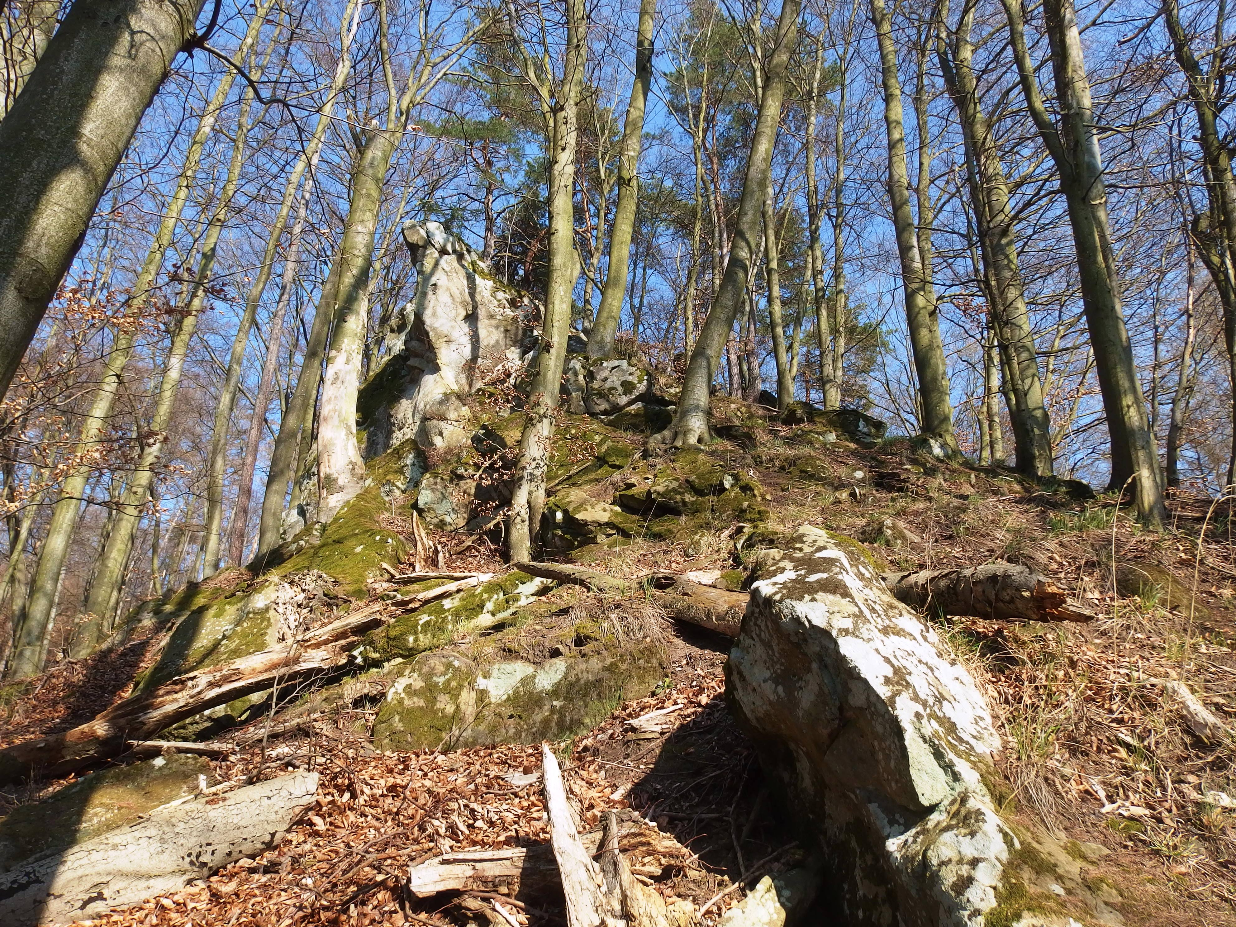 Chřiby, přírodní památka Maršava, skalní útvar Zbořené zámky.